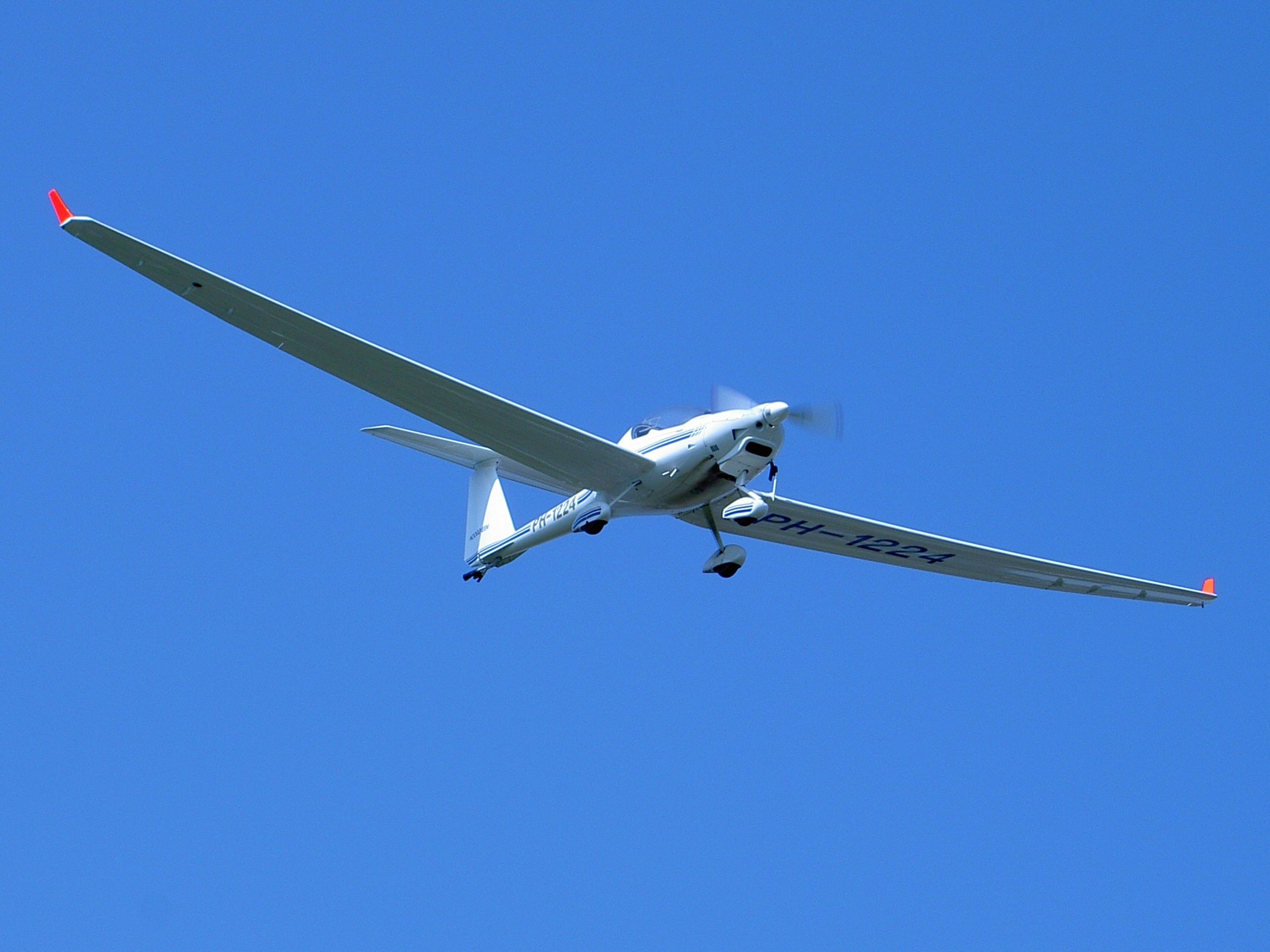 Diamond HK 36 TTC PH-1224 at hoogeveen airfield.